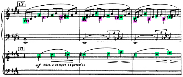 Рахманинов. 2-й концерт для фп. с оркестром, ч. II, фрагмент. Образец полиметрии (полиритмии)